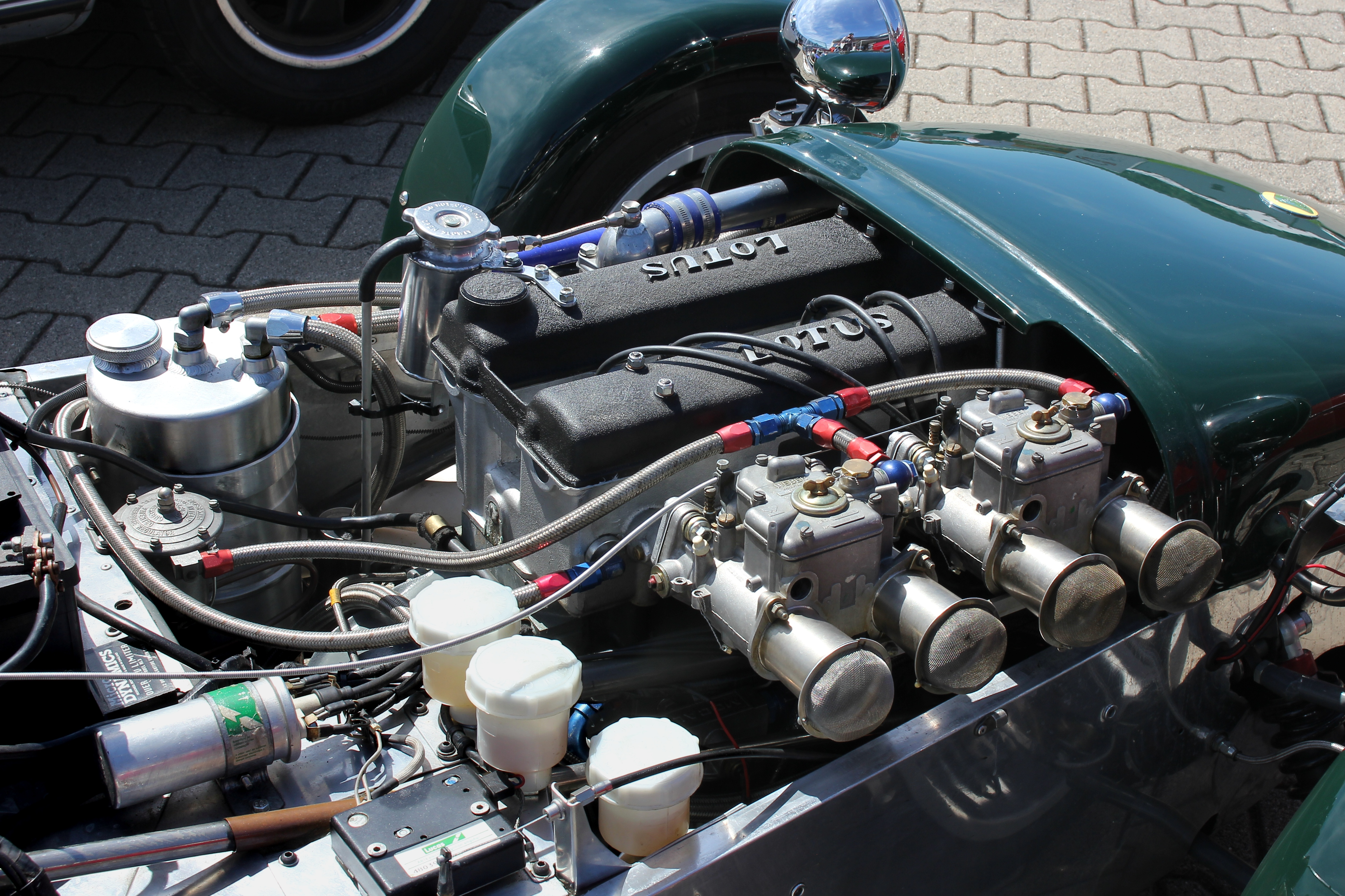 Einlassseite eines Lotus-Twin-Cam-Motors von 1969 (zwei obenliegende Nockenwellen), ca. 1600 cm³, 115–125 PS, eingebaut in einen Lotus Seven